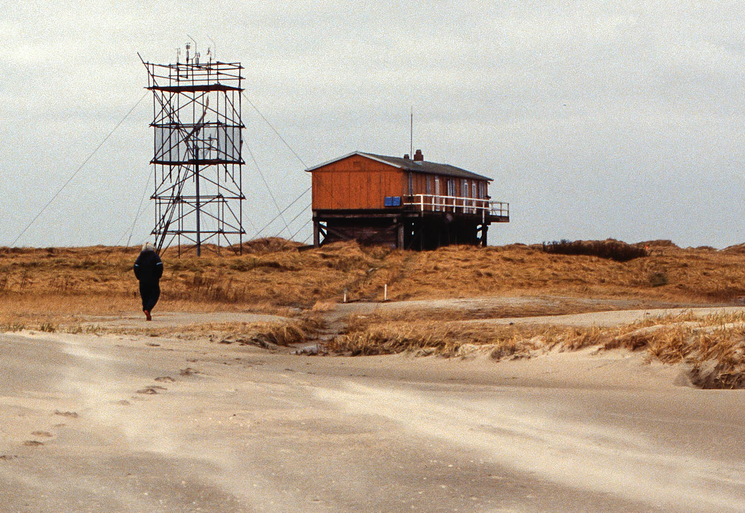 Das Hamburger Haus auf Scharhörn. Im Vordergrund der Wetterturm. Die große Solaranlage wurde bereits im Vorjahr abgebaut. (Aufnahme aus Richtung SSO aus dem März 1994)